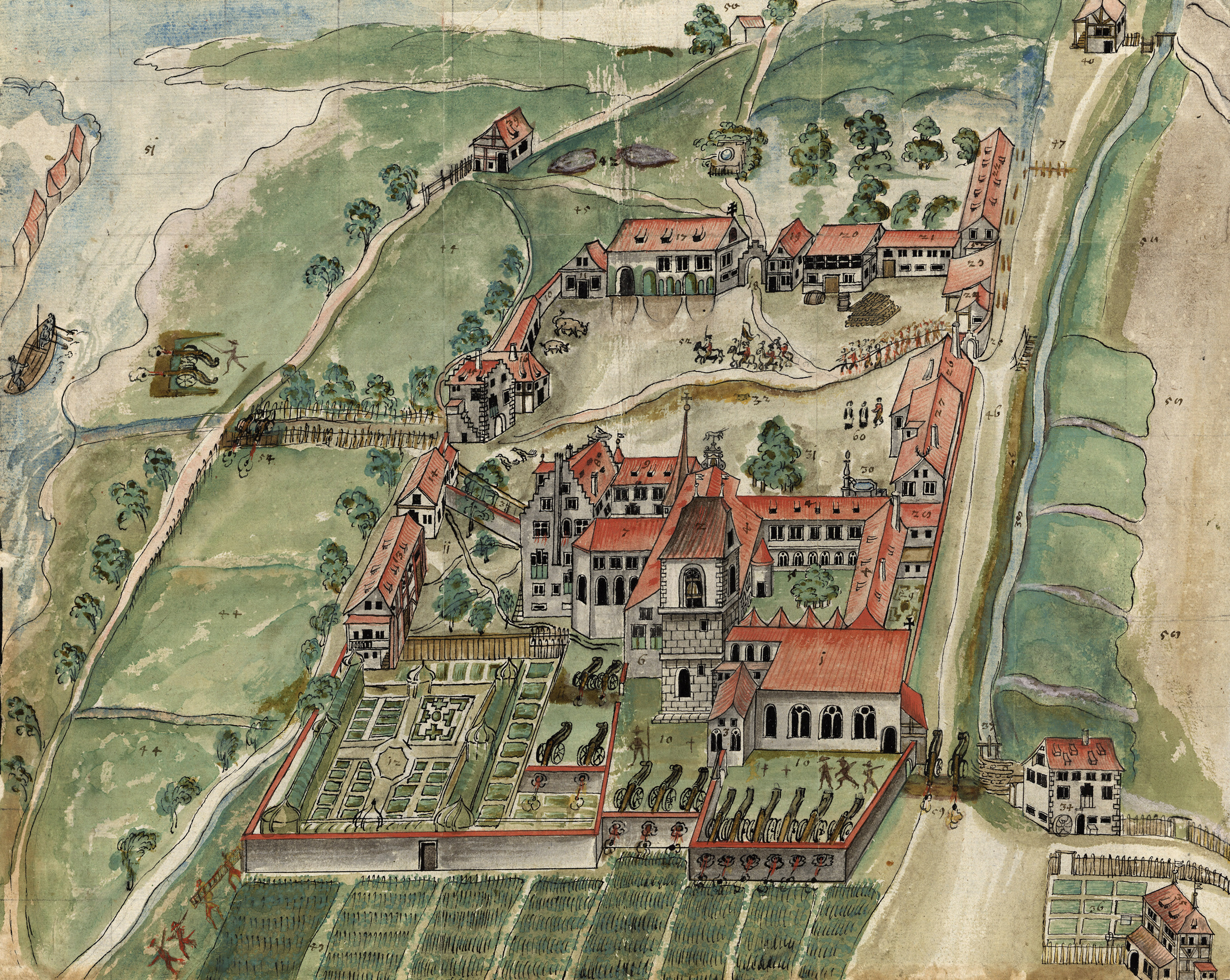 Schwedische Soldaten in Kloster Kreuzlingen, 1633 (GLAK H-BS I K 22)